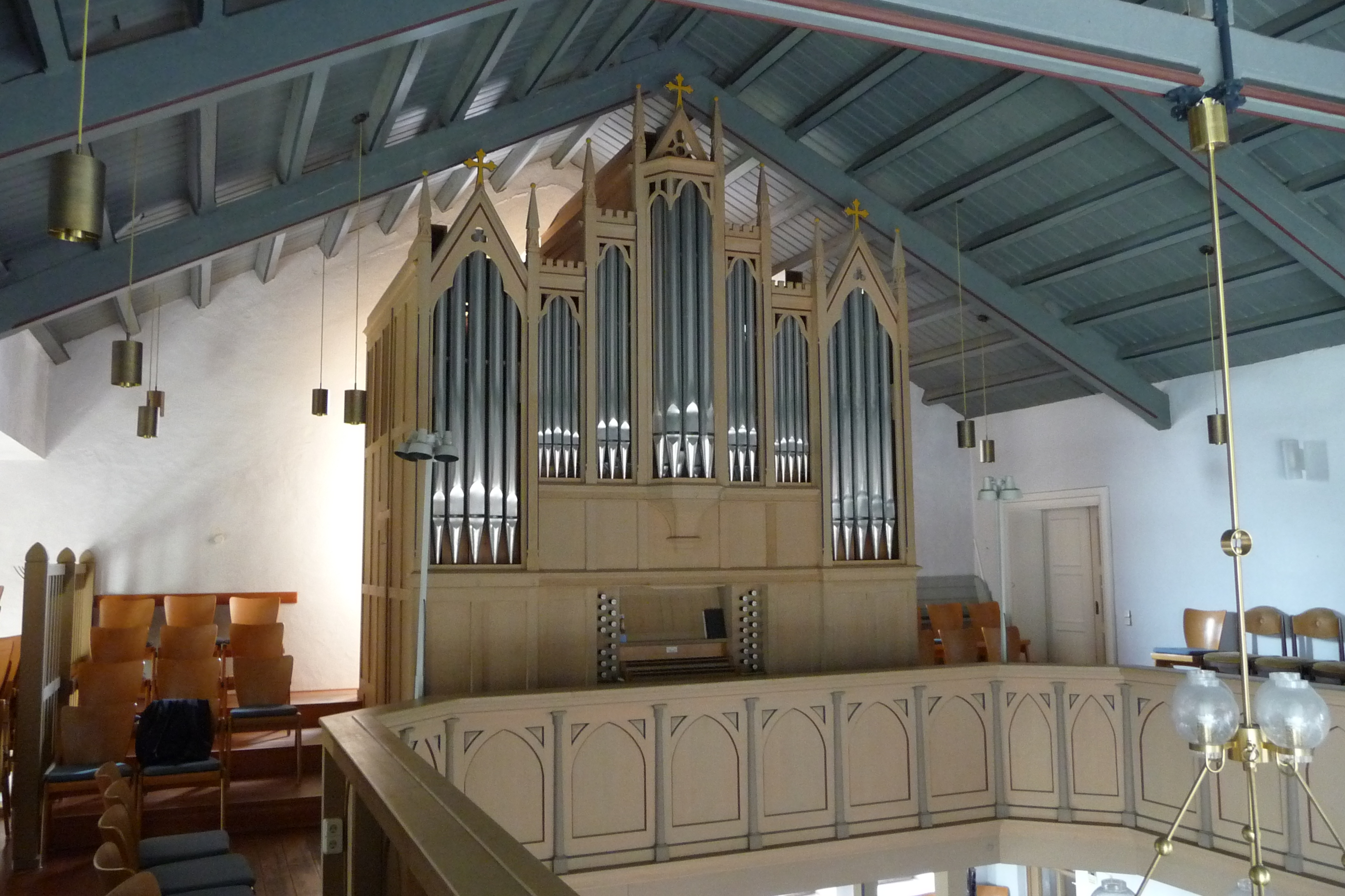 Orgel in der ev.-luth. Inselkirche Langeoog